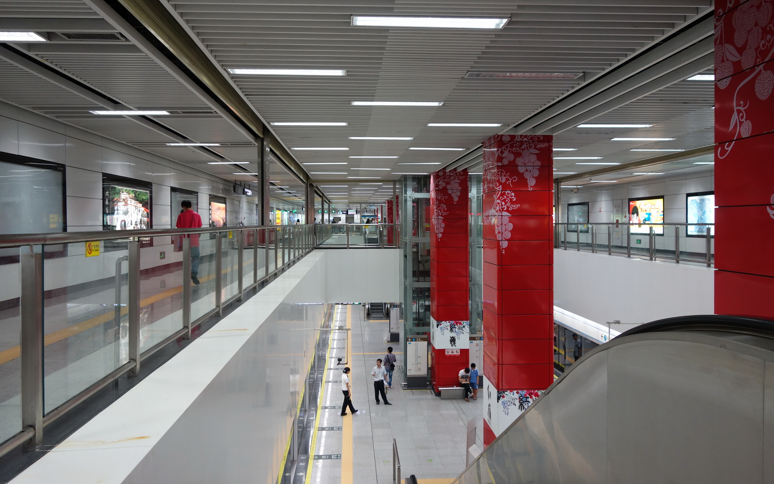 深圳地铁龙岗线红岭车站站厅层